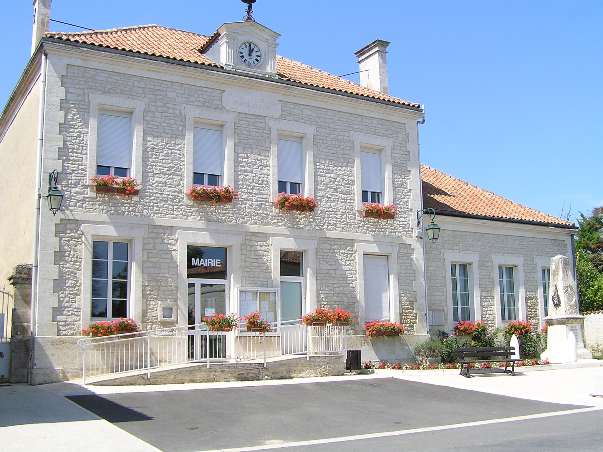 mairie de Douzat